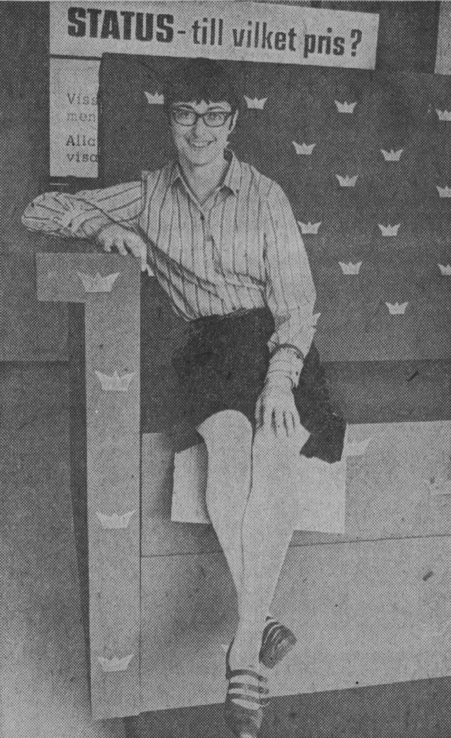 Inredningsarktiekten Ingrid Olausson i Svensk Forms skyltfönster